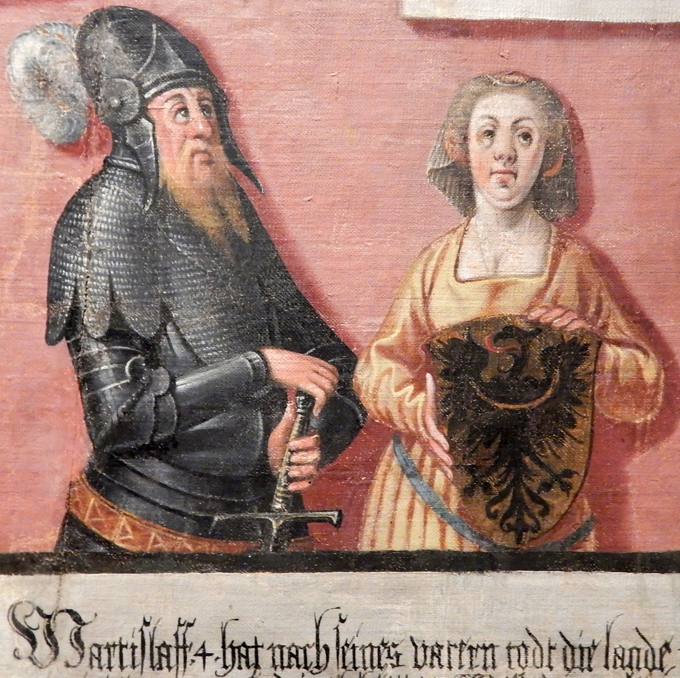 Wartislaw IV. von Pommern und seine Gemahlin Elisabeth von Lindau-Ruppin.